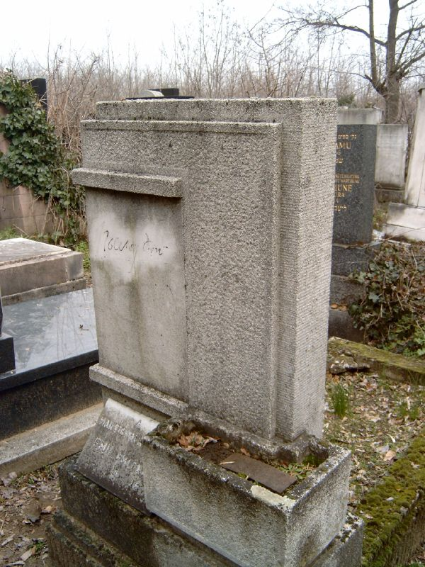 Szomory Dezső (1869. június 2. Pest - 1944. november 30. Budapest) író, újságíró, színműíró sírja Budapesten. Kozma utcai izraelita temető: 1A-10-20.